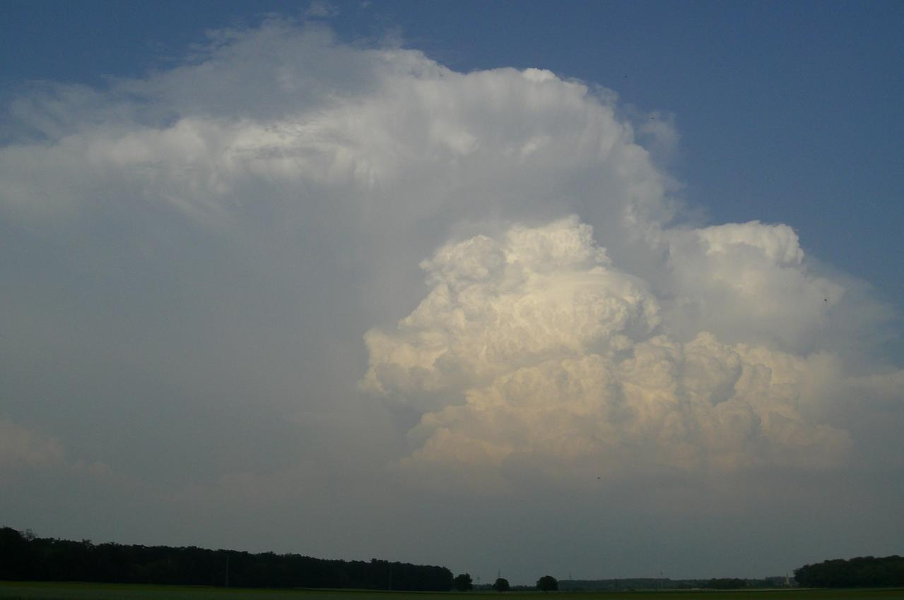 Cumulonimbus (Gewitterwolke) über den Feldern der Südpfalz. Fotografiert bei Kandel von Sebastian Geißert/Kandel